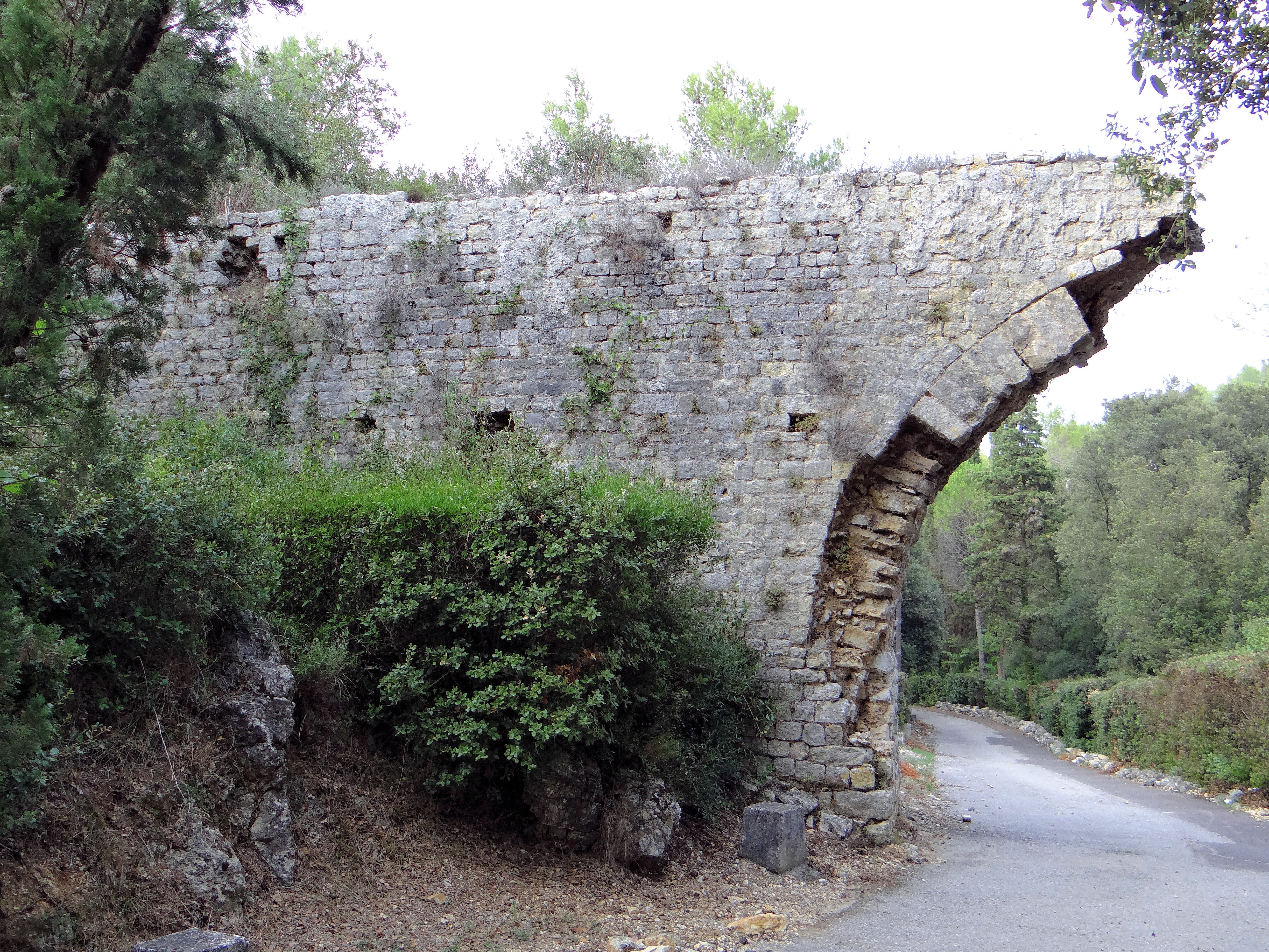 Antibes - Aqueduc de Clausonnes (pont du Goa) .